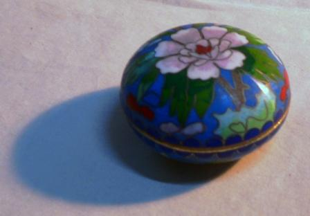 铜胎掐丝珐琅（景泰蓝）印泥盒 拍摄